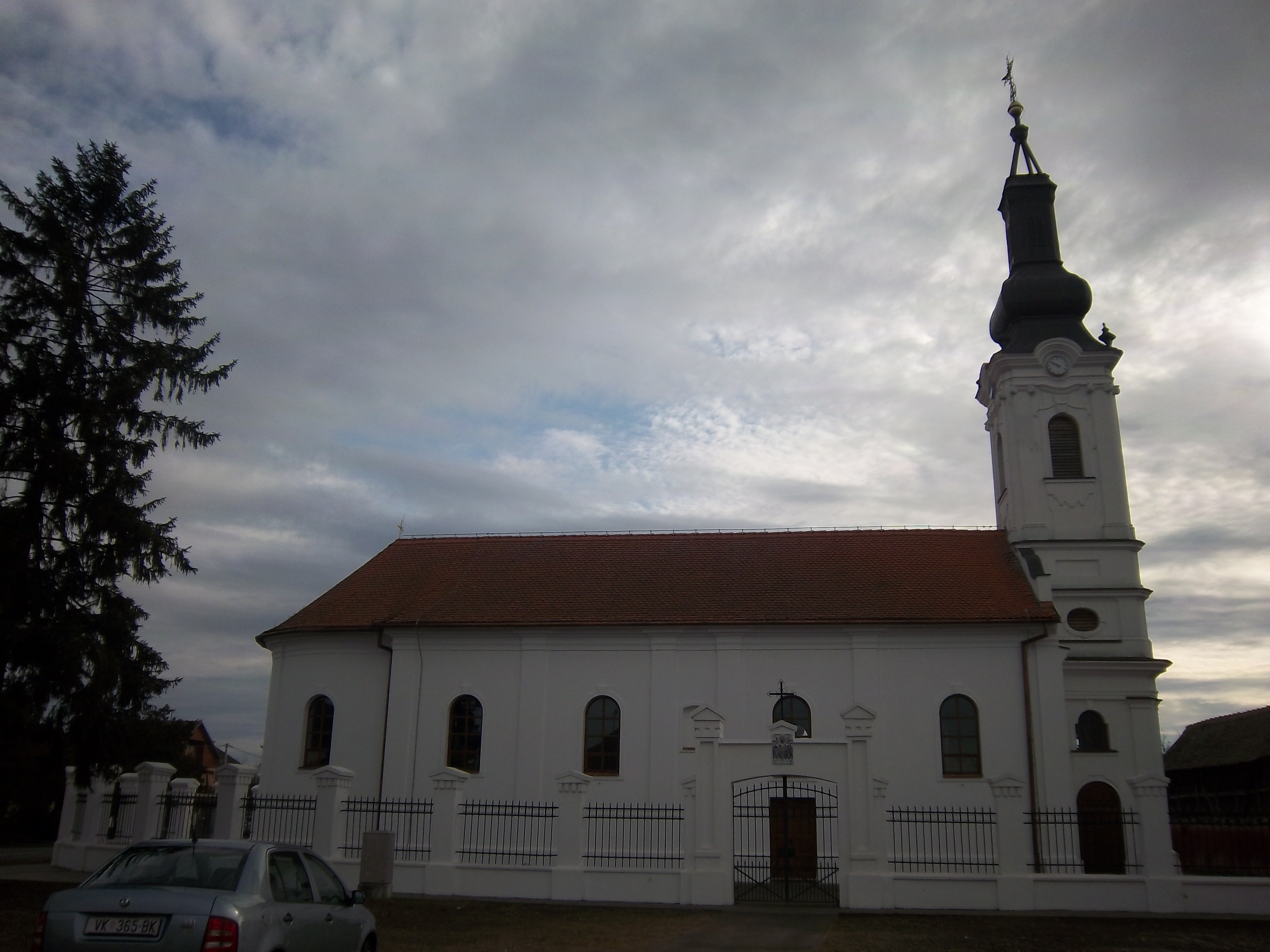 Pravoslavna crkva u Trpinji.